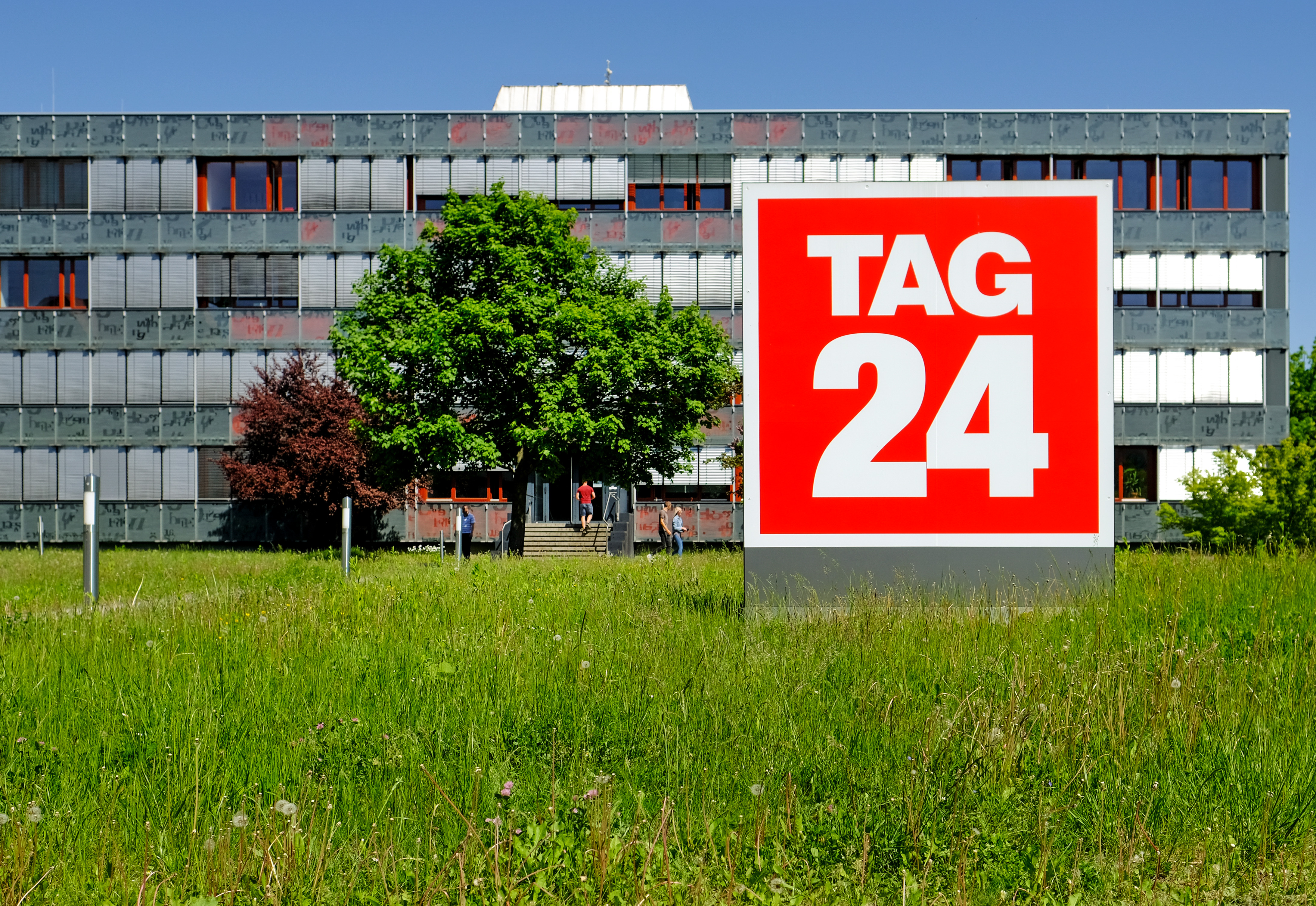 Frontalaufnahme des Redaktionsgebäudes in Dresden.